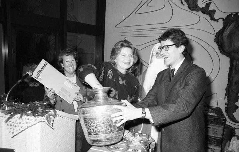 11.12.1989 Staatssekretär Dr. Jürgen Sudhoff eröffnet den Weihnachtsbasar des Auswärtigen Amtes - im Auswärtigen Amt